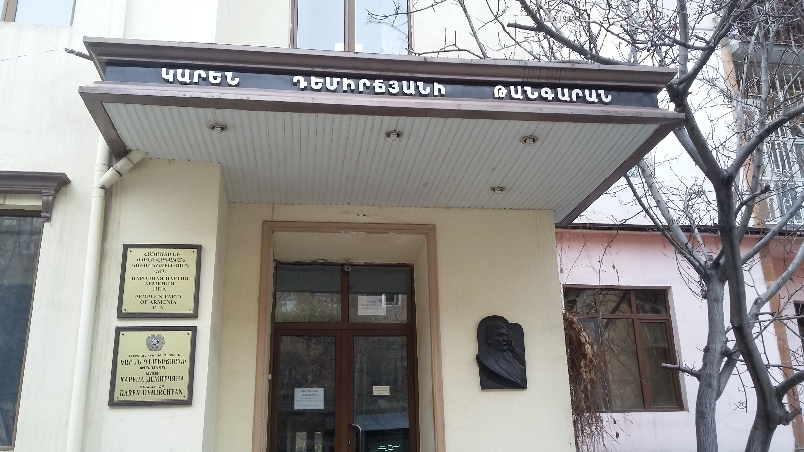 Կարեն Դեմիրճյանի թանգարան, Երևան